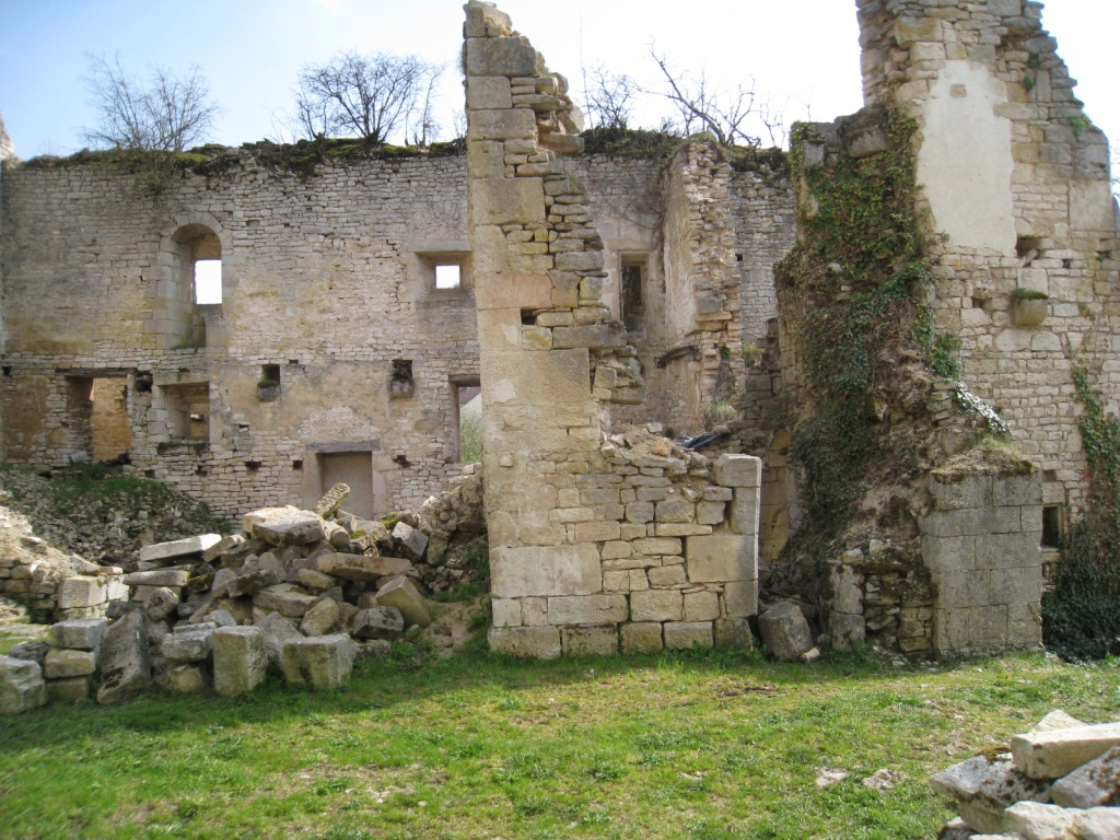 Commanderie_de_Bures